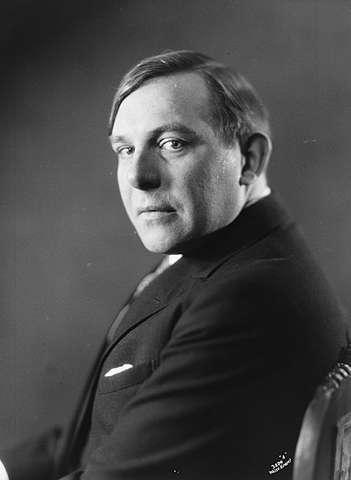 Norwegian writer Ronald Fangen.